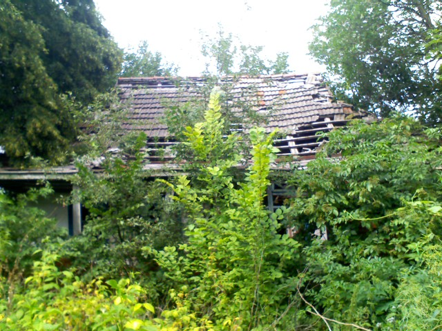 Хата в Шкурпелах, де народився Іван Гребенюк